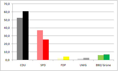 Wahl2006